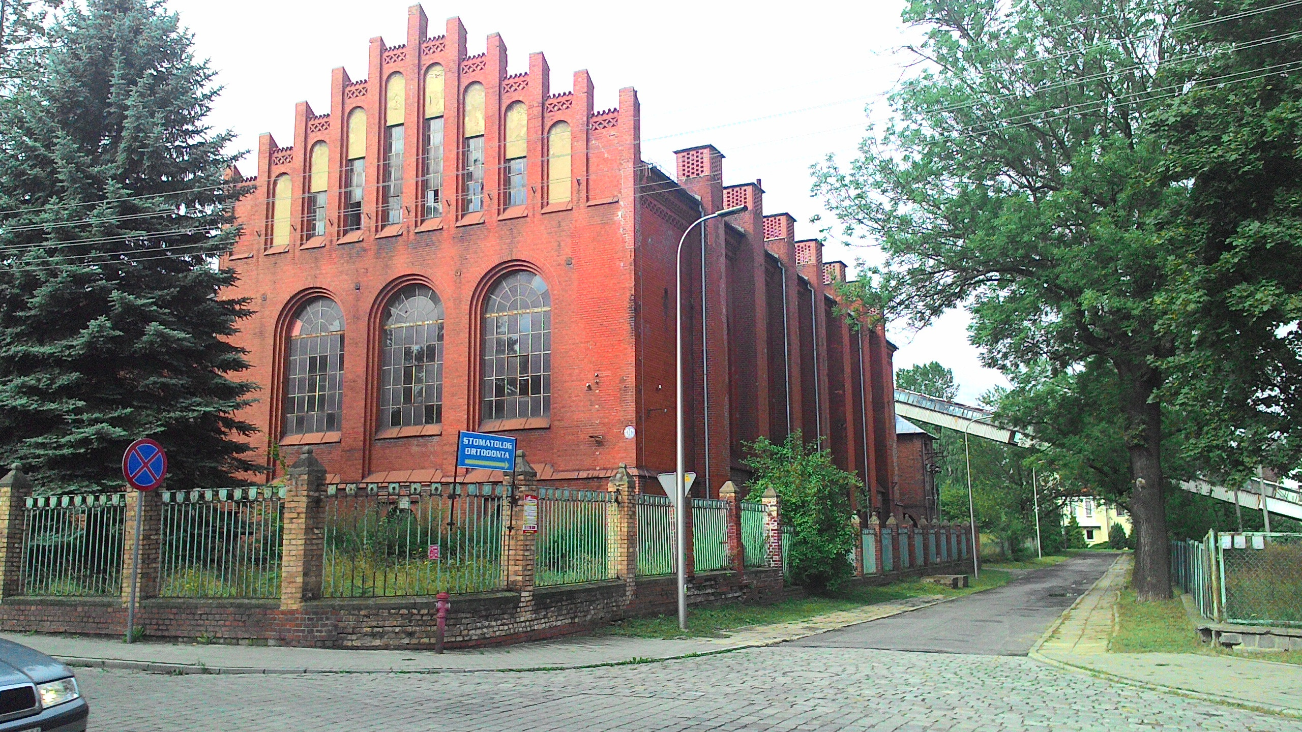 Dawna elektrociepłownia Zakładów Przemysłu Bawełnianego „Frotex” w Prudniku.